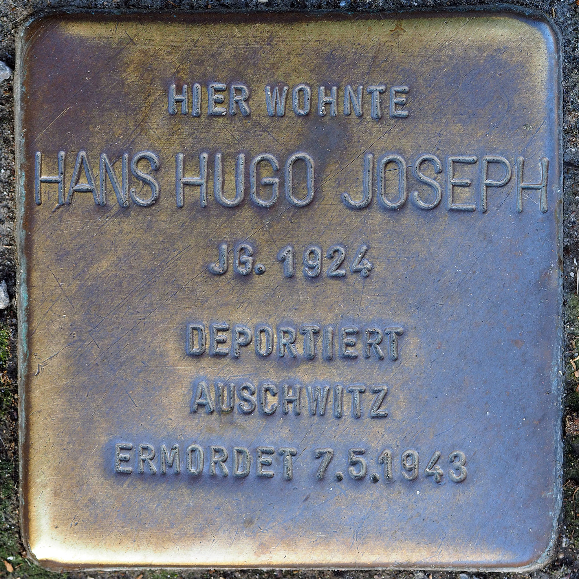 Stolpersteine MG: Joseph, Hans Hugo